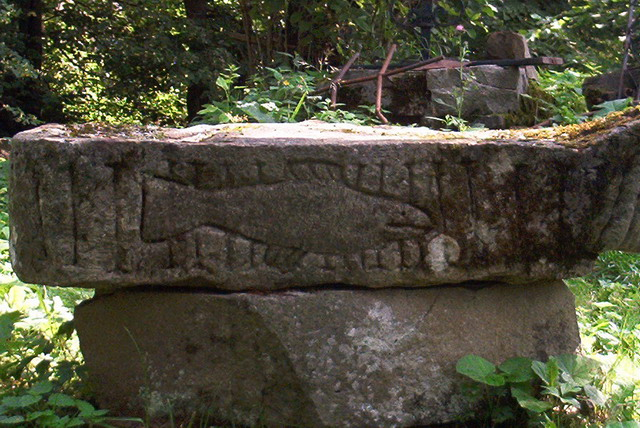 kamień z rybą z Beniowej